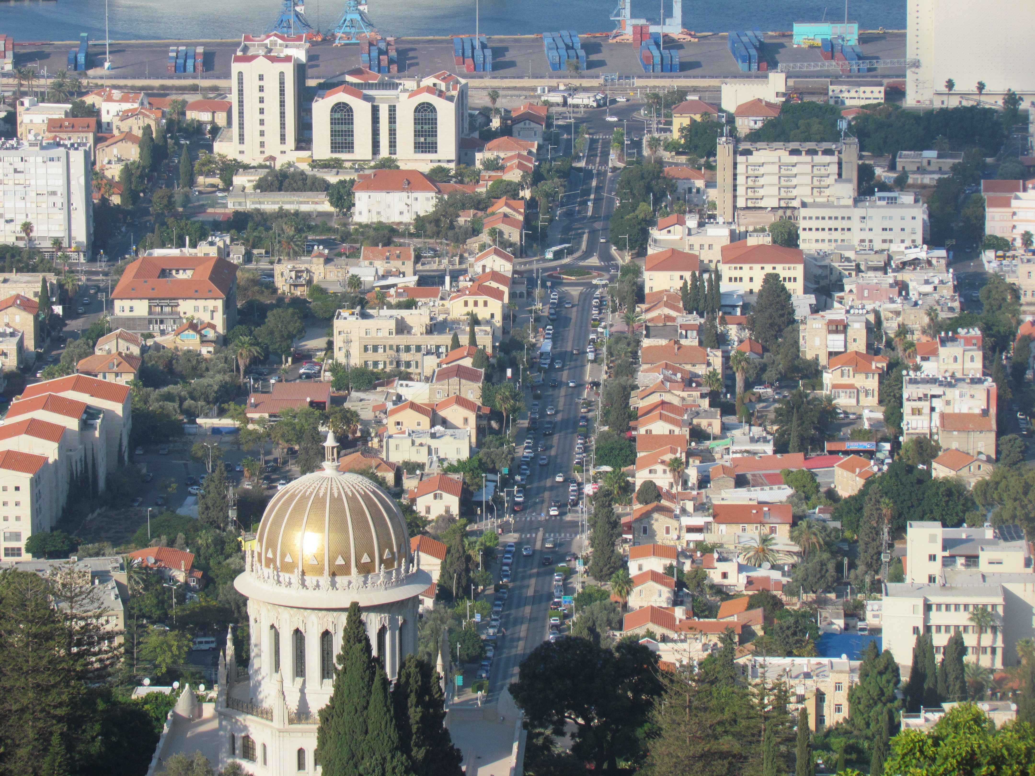 הגנים הבהאיים-המרכז הבהאי העולמי,המתחם הבהאי על הר הכרמל בחיפה